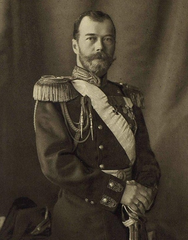 Nicholas II, Tsar of Russia, in 1913.